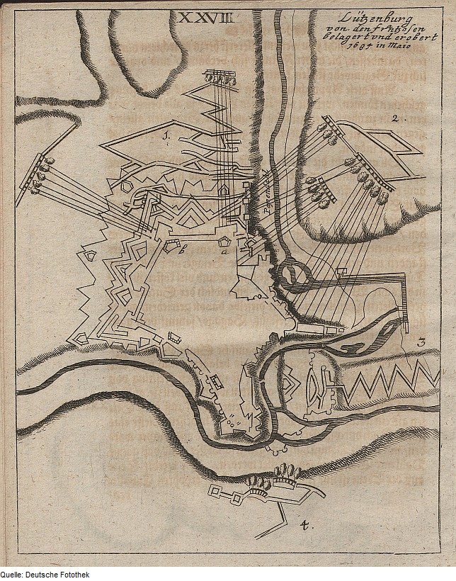 Original image description from the Deutsche Fotothek Architektur & Festungsbau & Angriff